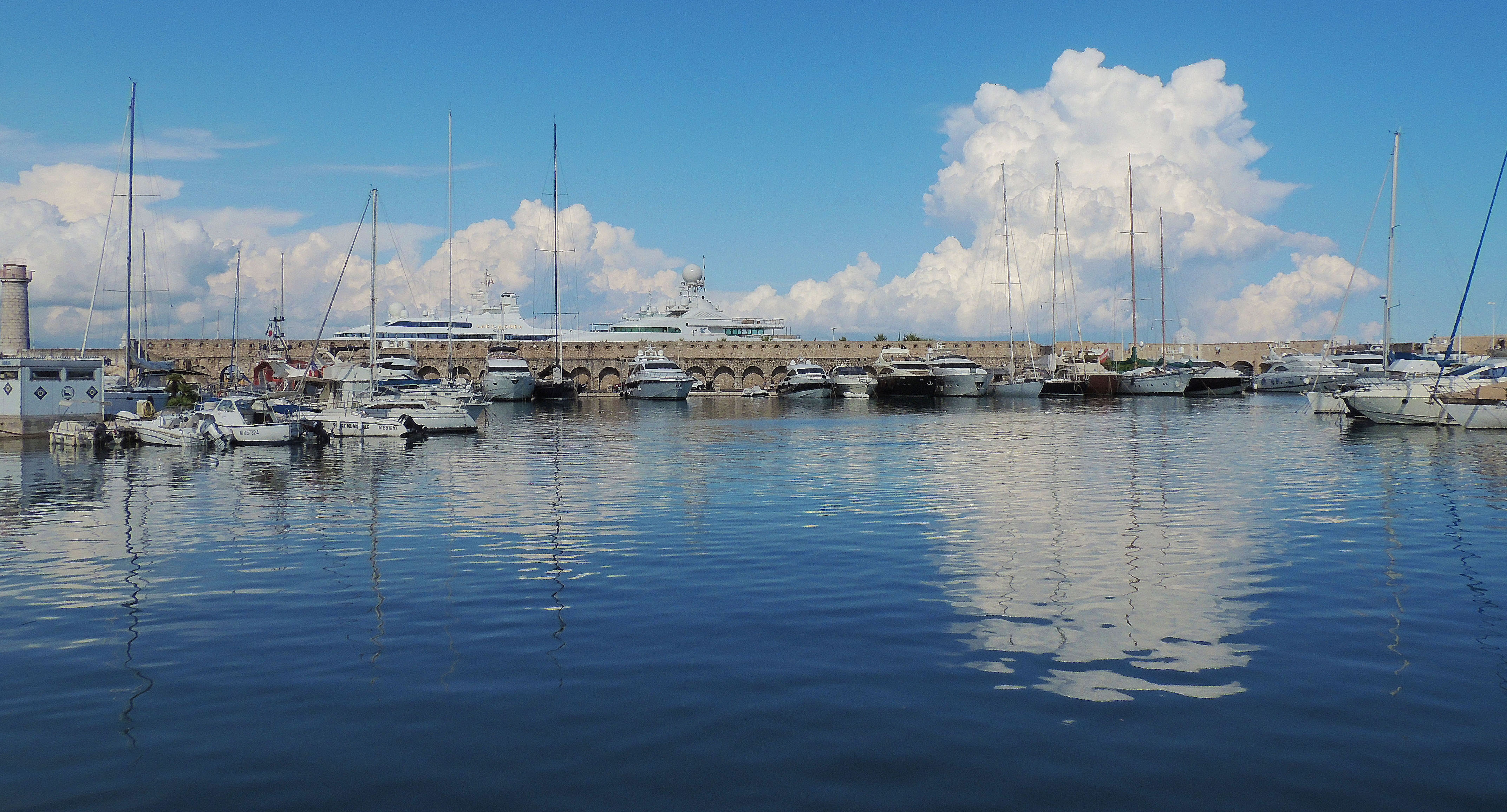 Jetée de Saint-Tropez dit aussi môle d'Estienne d'Orves.